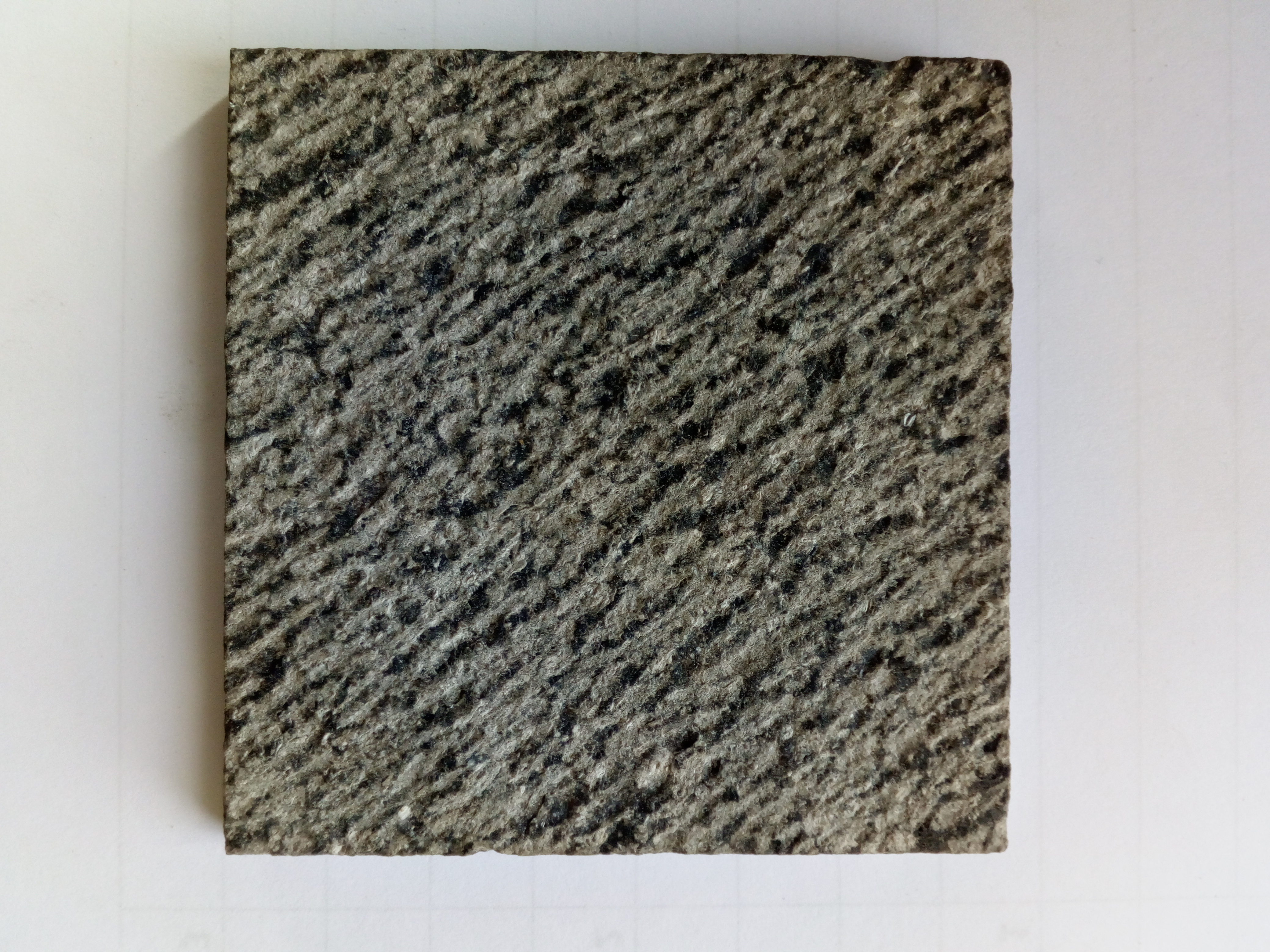 oude frijnslag van blauwsteen